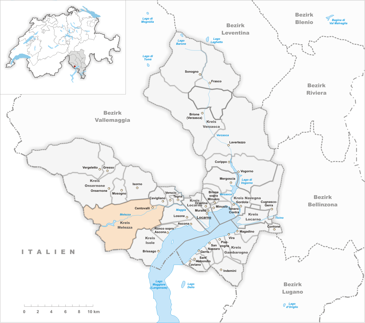 Municipality Centovalli Artist: Tschubby